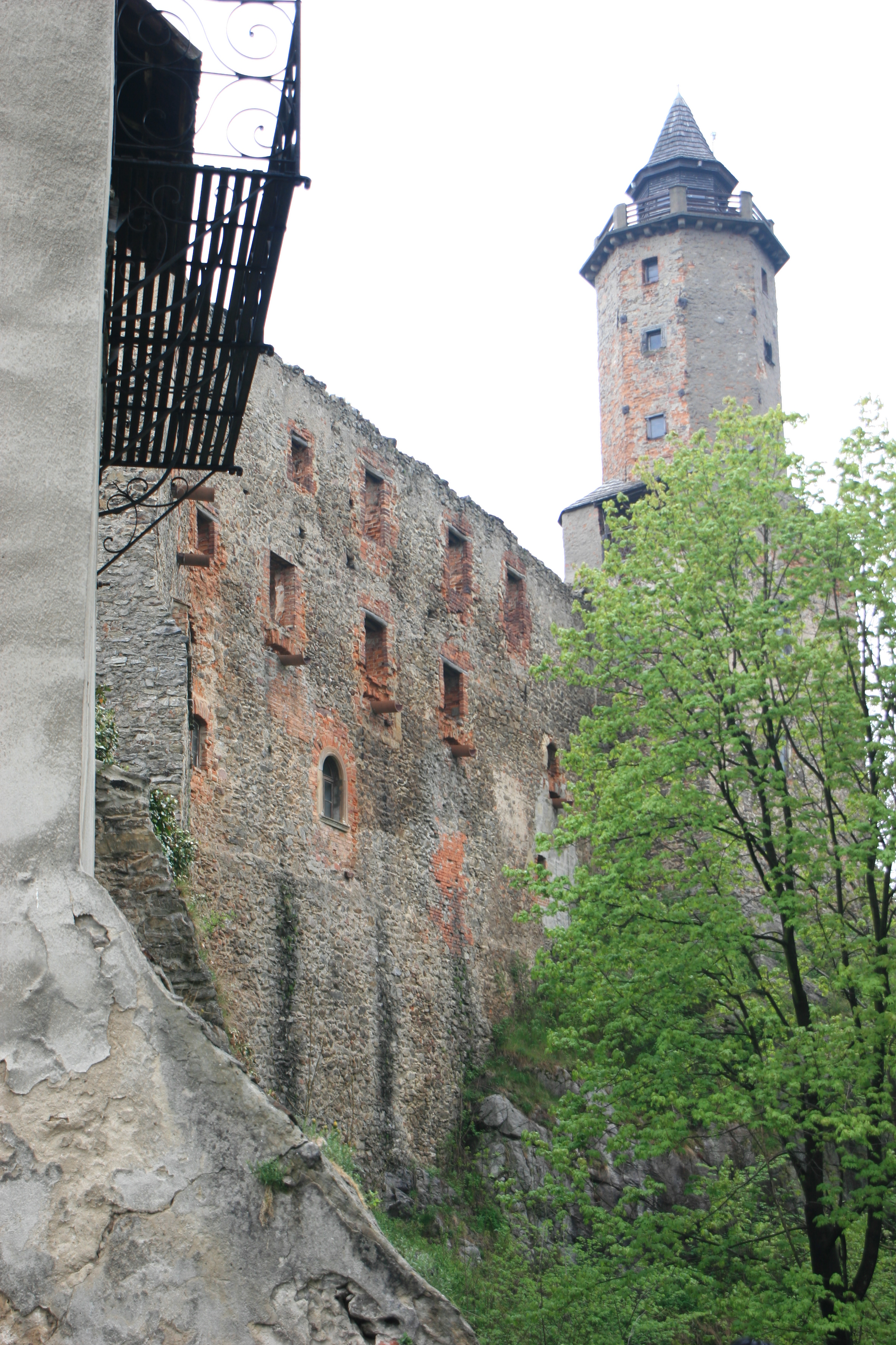 zamek „Grodno”, 1 poł. XIV, XV, 2 poł. XVI, 1868-69, 1904 Zagórze Śląskie, Walim